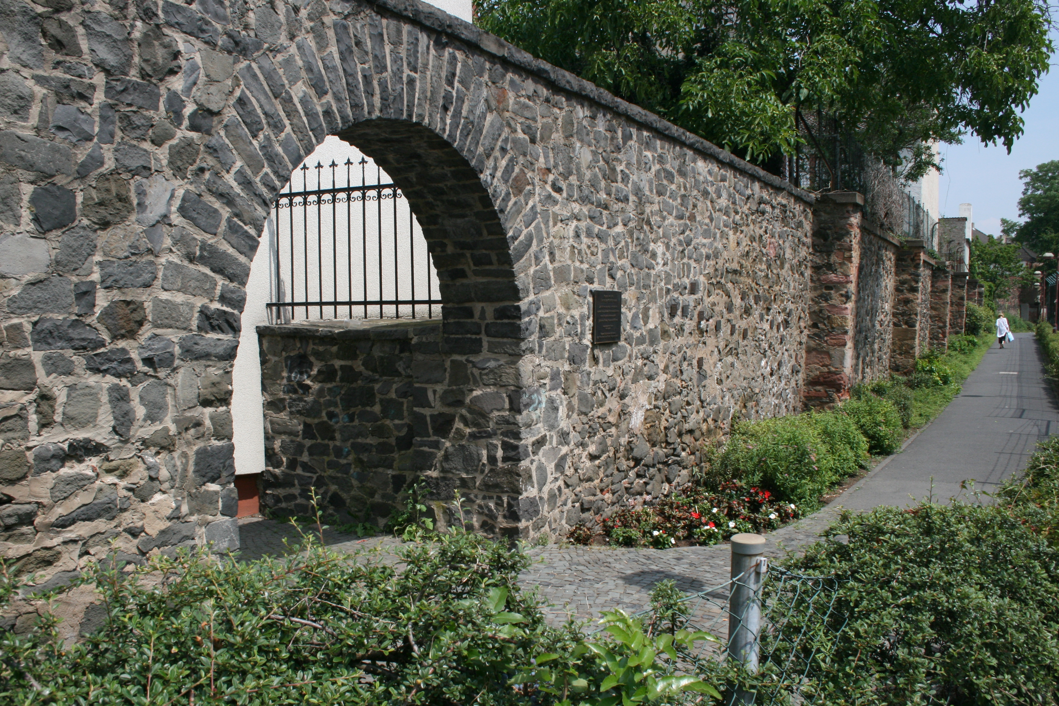 Gedenkstätte an der ehemaligen Ghetto-Mauer in Hanau.